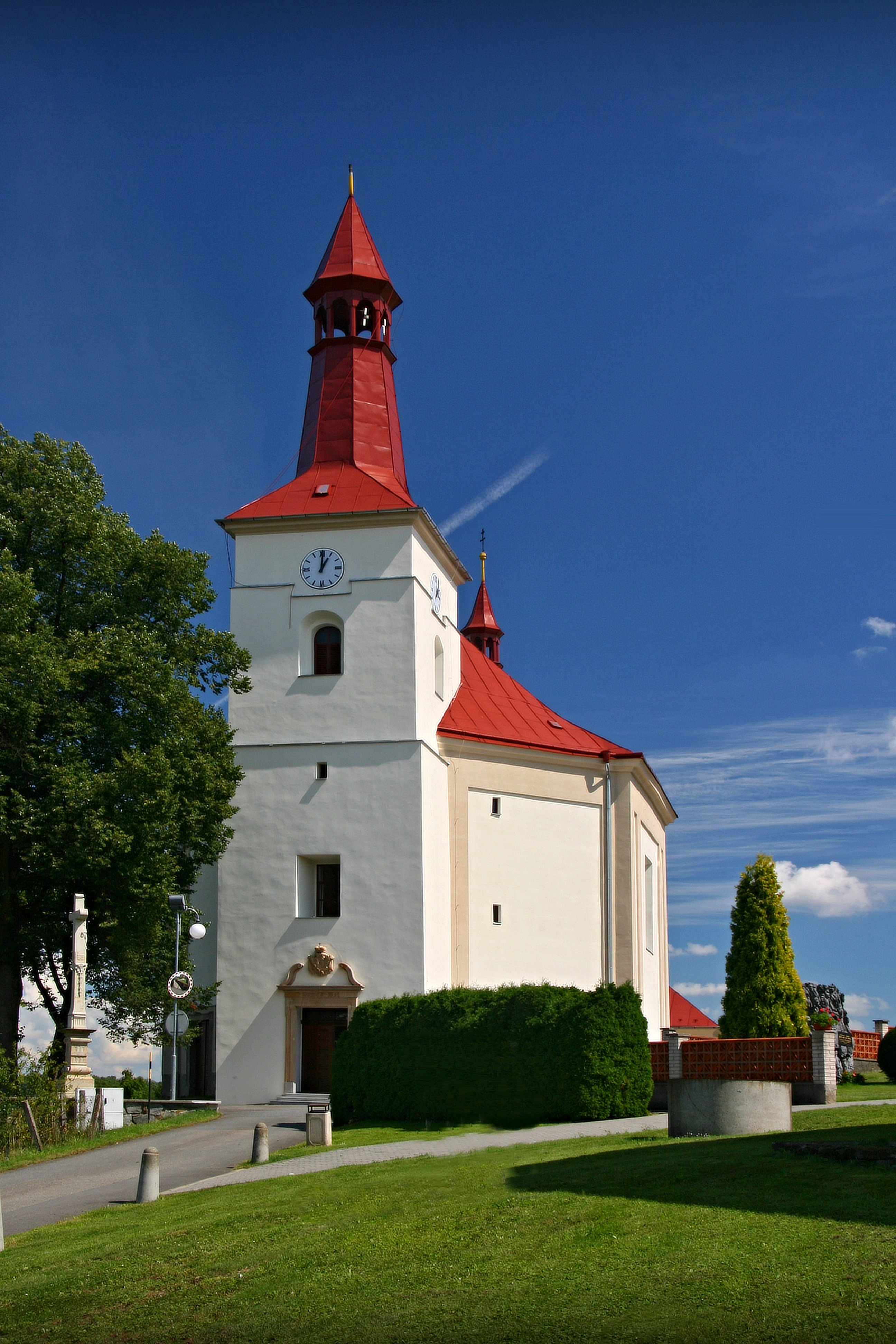 Kostel svatého Jiří, Bělotín.